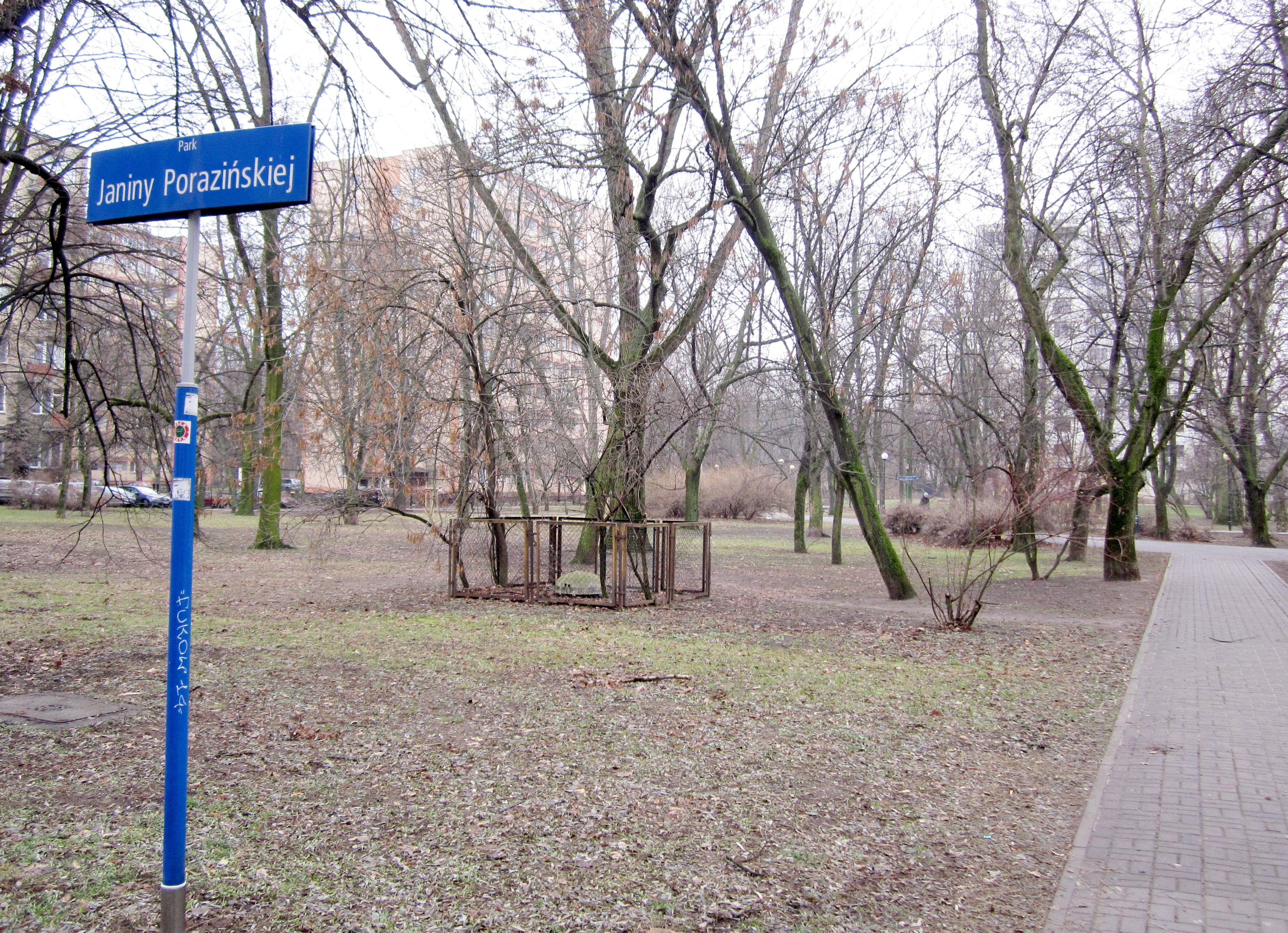 Park Janiny Porazińskiej, Warszawa